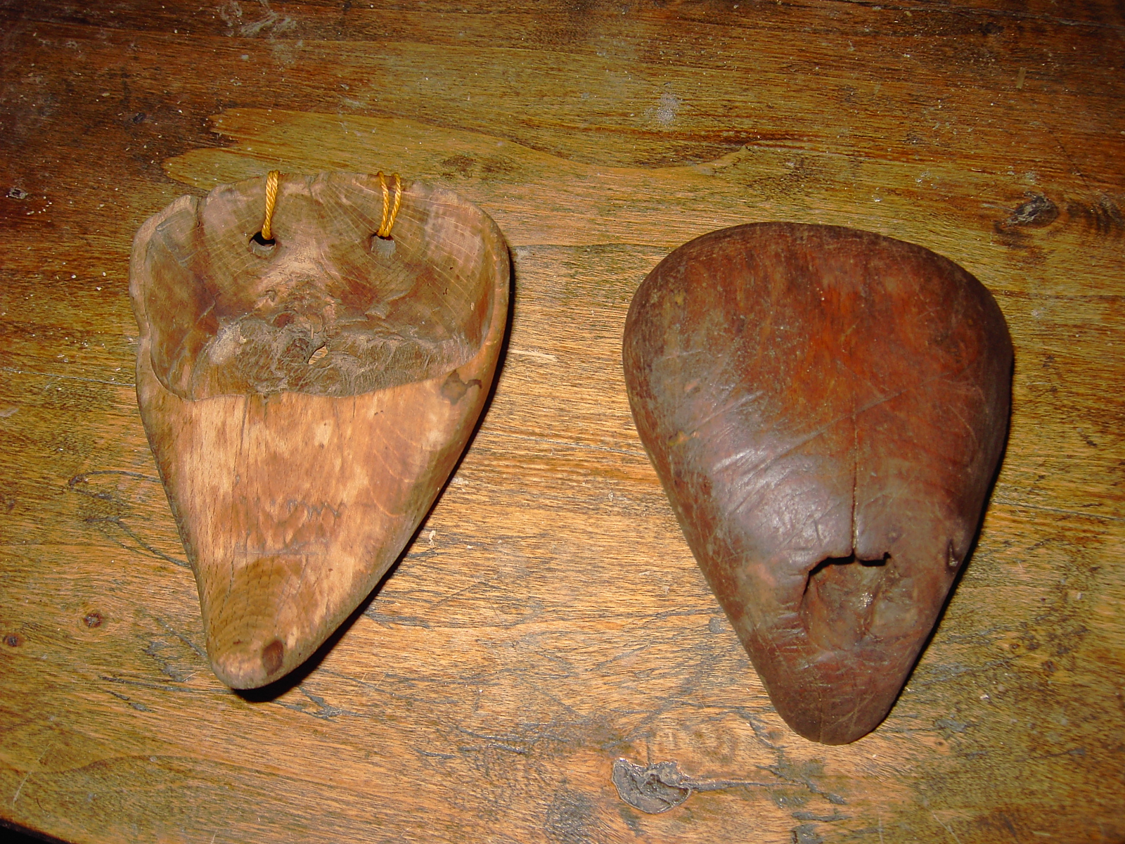 zoquetas (palabra aragonesa), piezas de madera talladas artesanalmente donde se introducían 4 de los dedos de la mano que debía sujetar la mies mientras la mano contraria la segaba con la hoz, protegiéndolos de esta manera de eventuales cortes. Sólo quedaba libre el pulgar para poder sujetar las espigas.